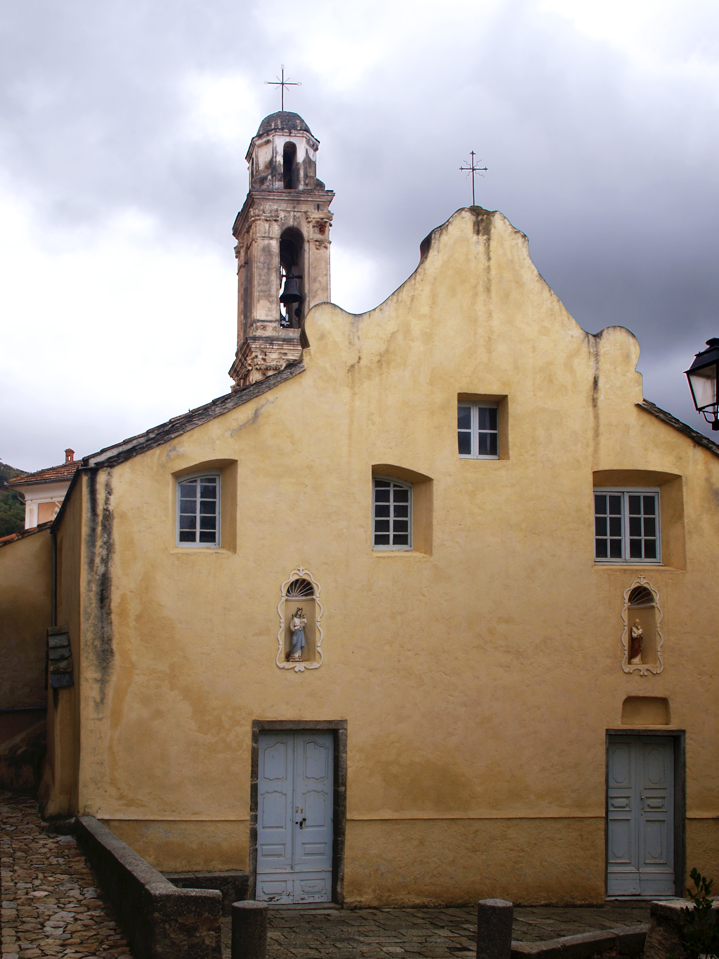 Corsu: A Costa, Balagna (Corsica) - A chjesa San Salvadore